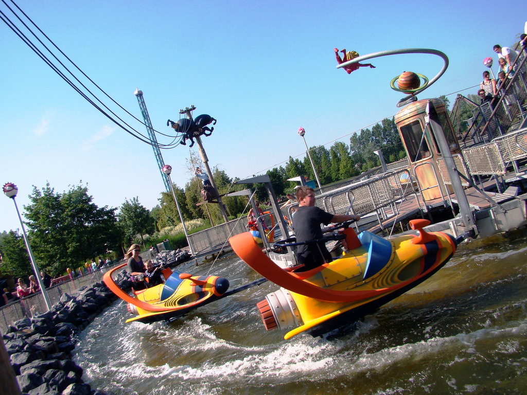 Attraction